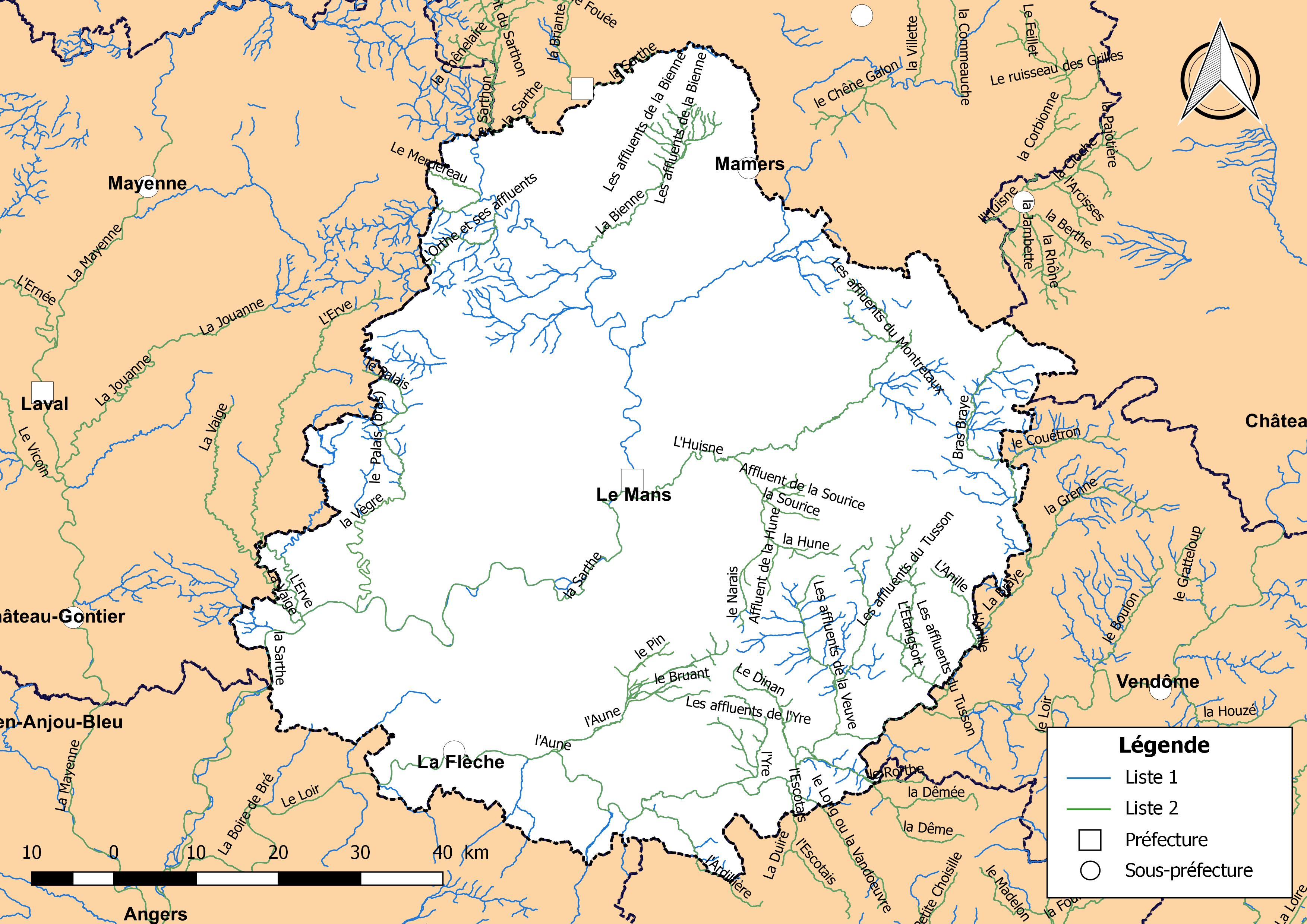 Classement des cours d'eau du département de la Sarthe (France) au titre de la continuité écologique (article L214.17 I du Code de l'environnement).